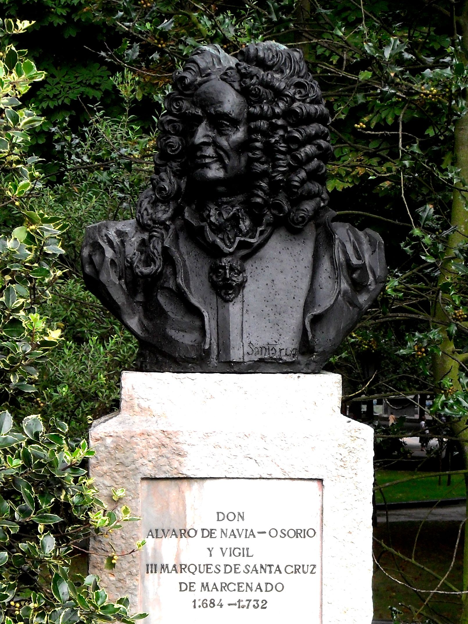 Busto del III Marqués de Santa Cruz, en el parque San Francisco de Oviedo, al lado de la calle que lleva su nombre